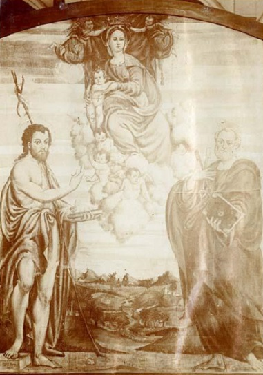 Madonna col Bambino e i santi Giovanni Battista e Pietro, olio su tela, 190 x 144 cm., firmato e datato, Agrons, Ovaro, chiesa di Santa Maria di Gorto